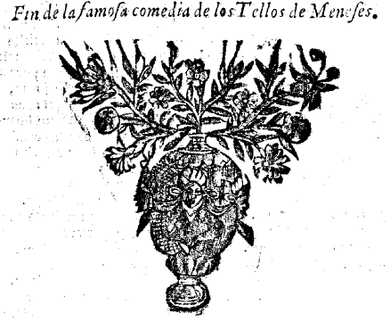 última página en las Veinte y vna parte verdadera de las comedias del Fenix de España frei Lope Felix de Vega Carpio